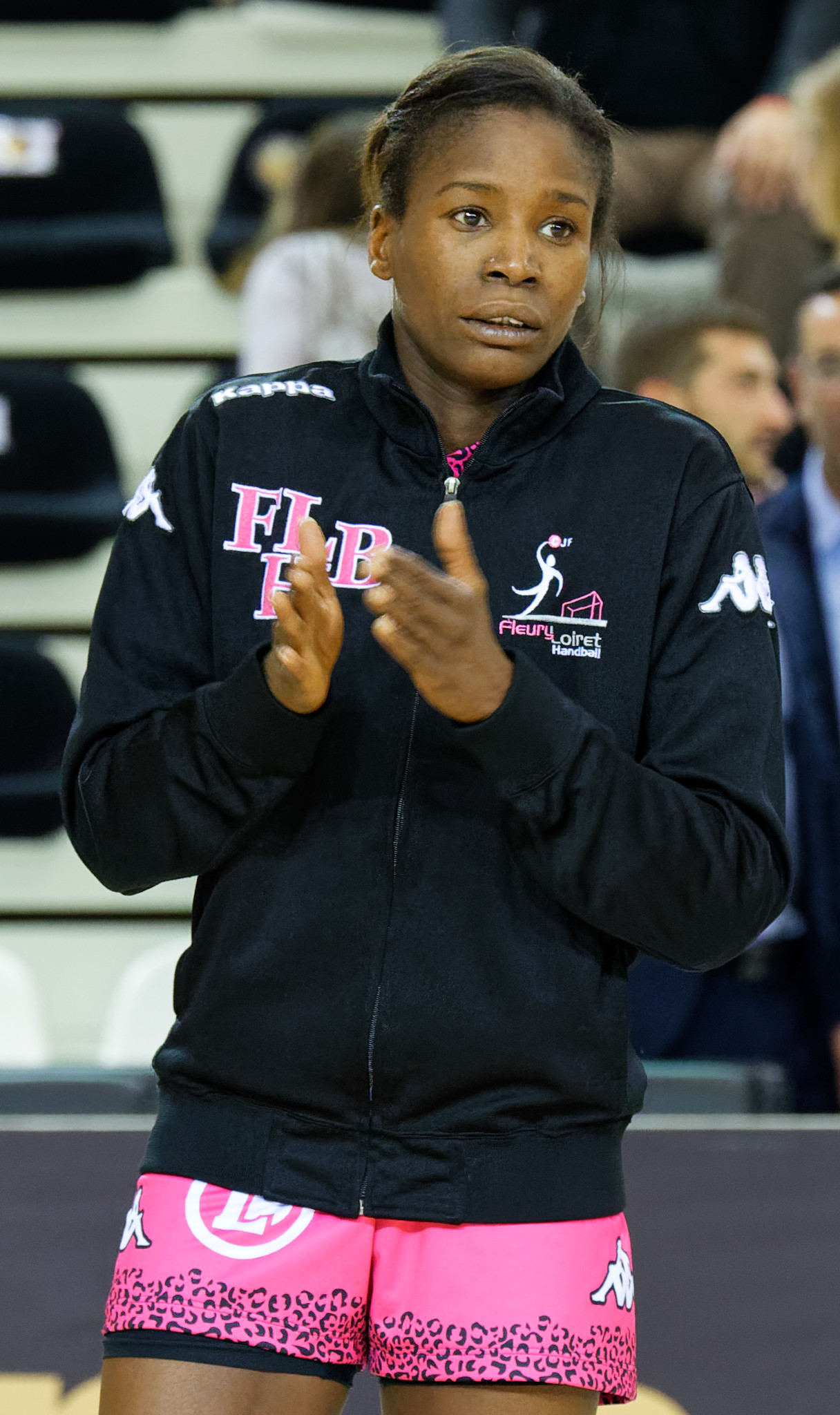 Rencontre de championnat entre Issy Paris Hand et fleury. A Issy Les Moulineaux, le 22 septembre 2015